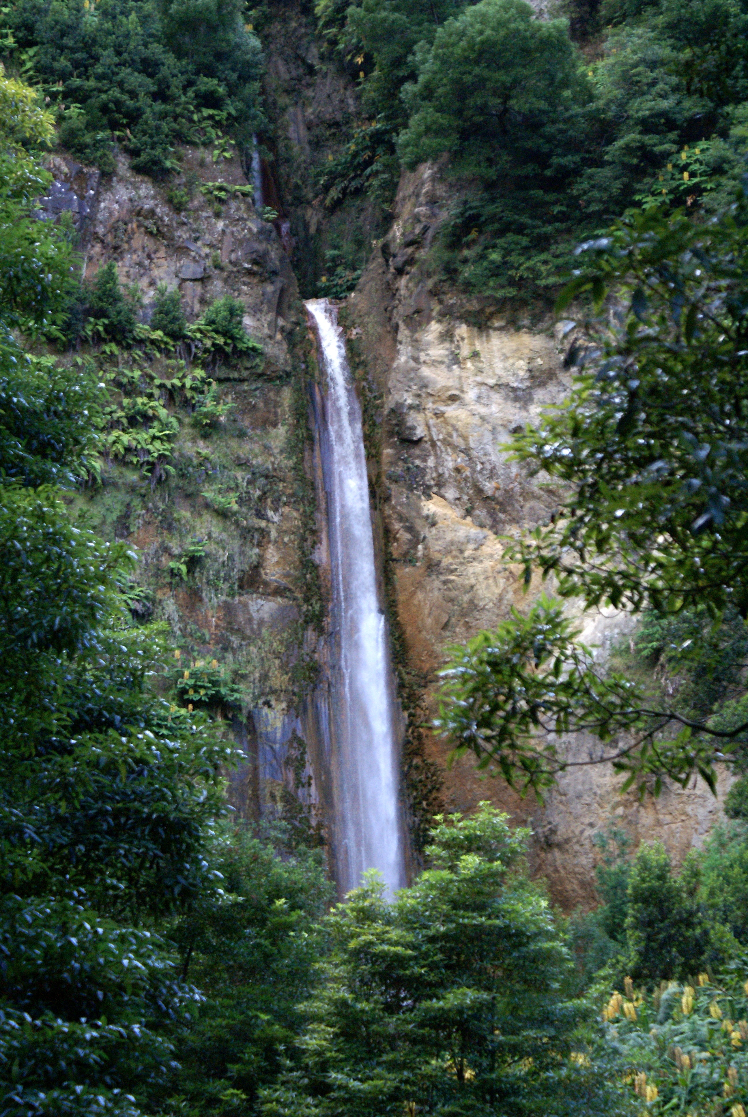 Cascatas, Ribeira Quente, ilha de São Miguel, Açores